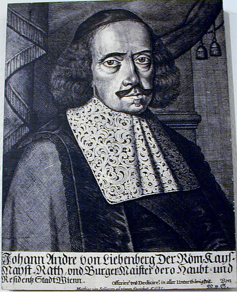 Der Bürgermeister von Wien Johann Andreas von Liebenberg (1627-1683) zur Zeit der 2. türkischen Belagerung der Stadt